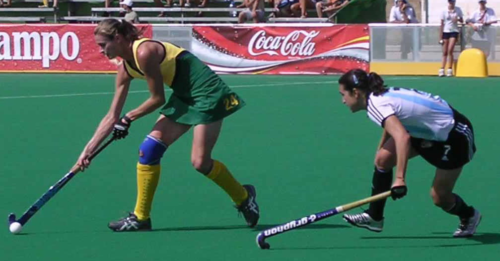 Trabajo propio